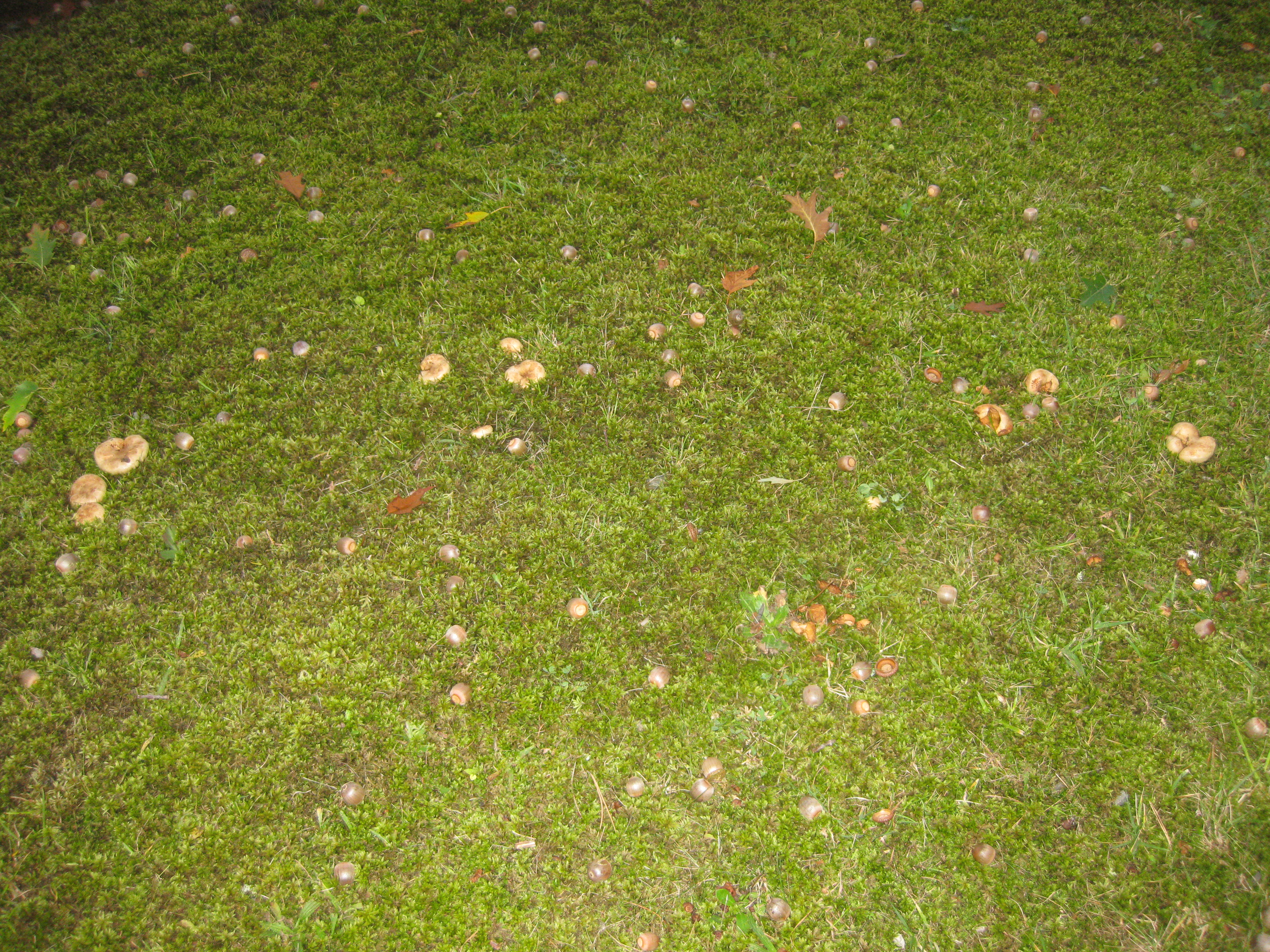 Ruhland, Ortrander Straße bei Hausnr. 11, Kahler Krempling (Paxillus involutus) und Gewöhnliches Bäumchenmoos (Climacium dendroides); die Kremplinge bilden einen hallben Hexenkreis